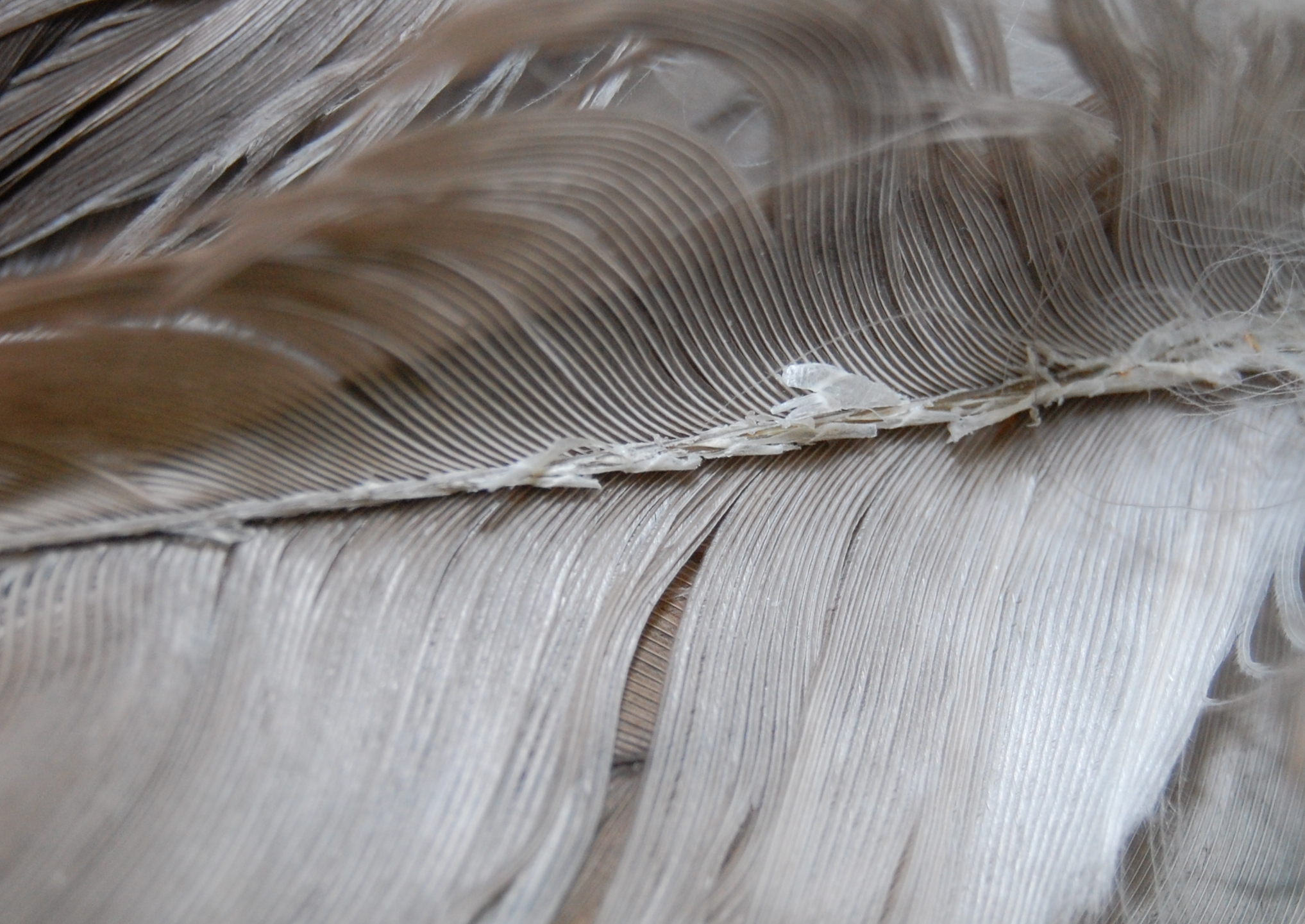 Unterseite der Deckfeder eins flüggen Seeadlers (Haliaeetus albicilla) mit "Pinching Off"-Syndrom. Man beachte die starken Keratinauflagerungen auf der Unterseite des Federkiels. Fund lebend am 1.10.2009 im Kreis Parchim, Mecklenburg-Vorpommern. Die Aufnahme entstand in der Kleintierklinik der FU Berlin, der Vogel war zum Zeitpunkt der Aufnahme bereits eingeschläfert.